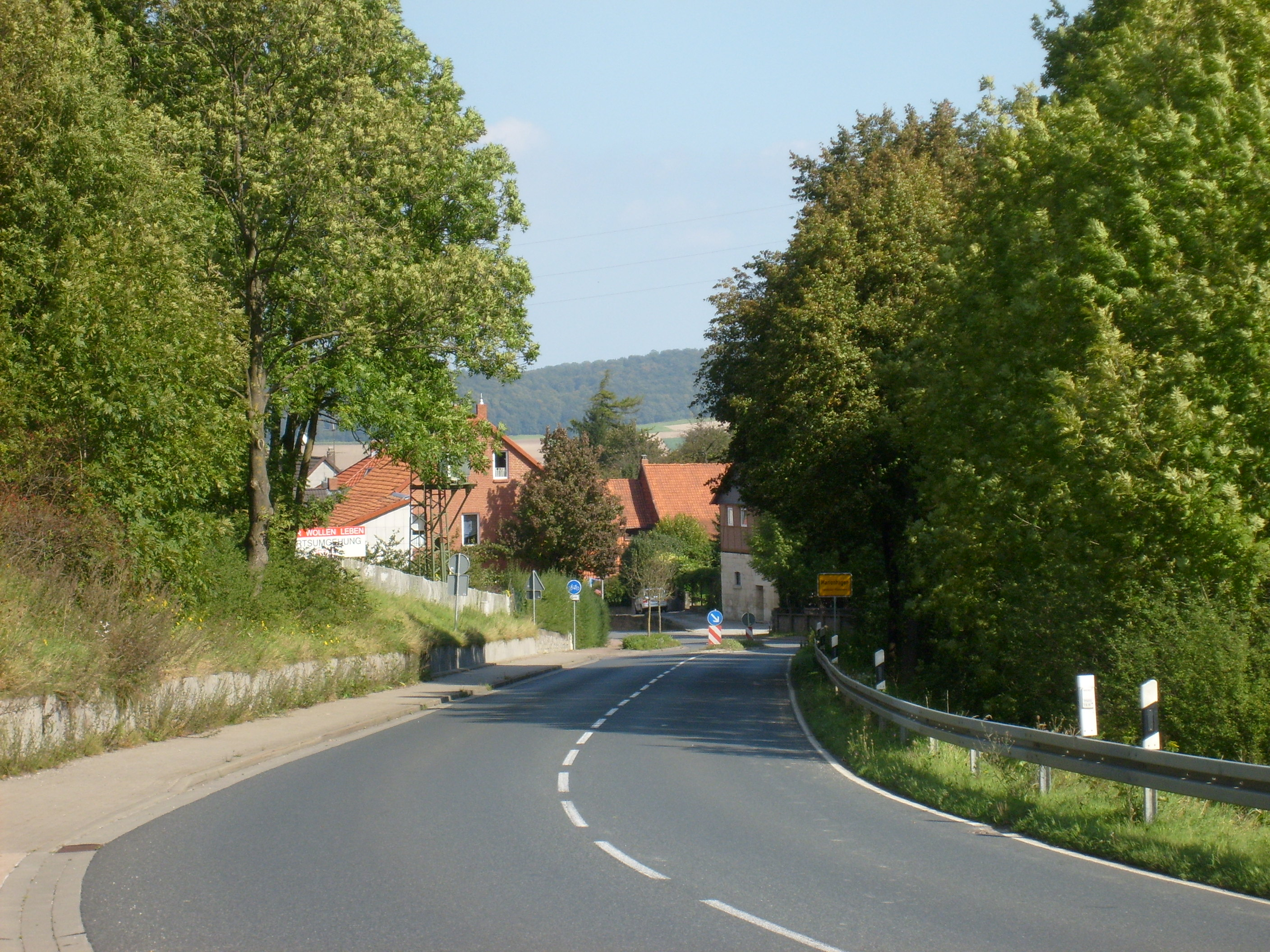 Ortseingang von Marienhagen (Landkreis Hildesheim)